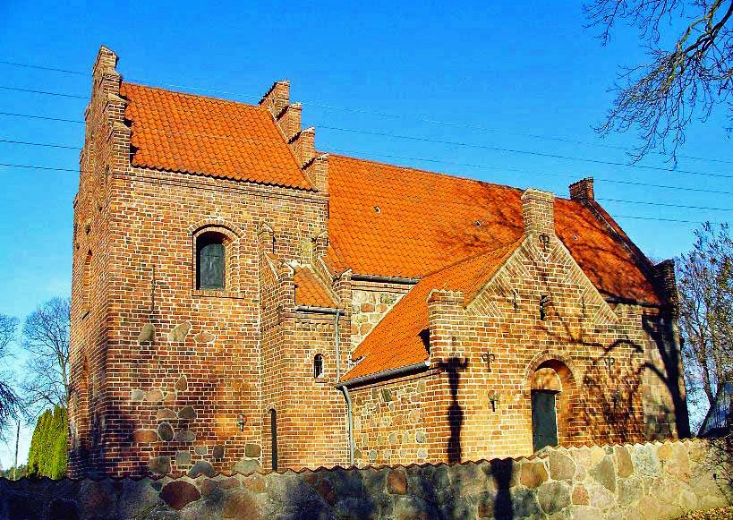 fra sydvest